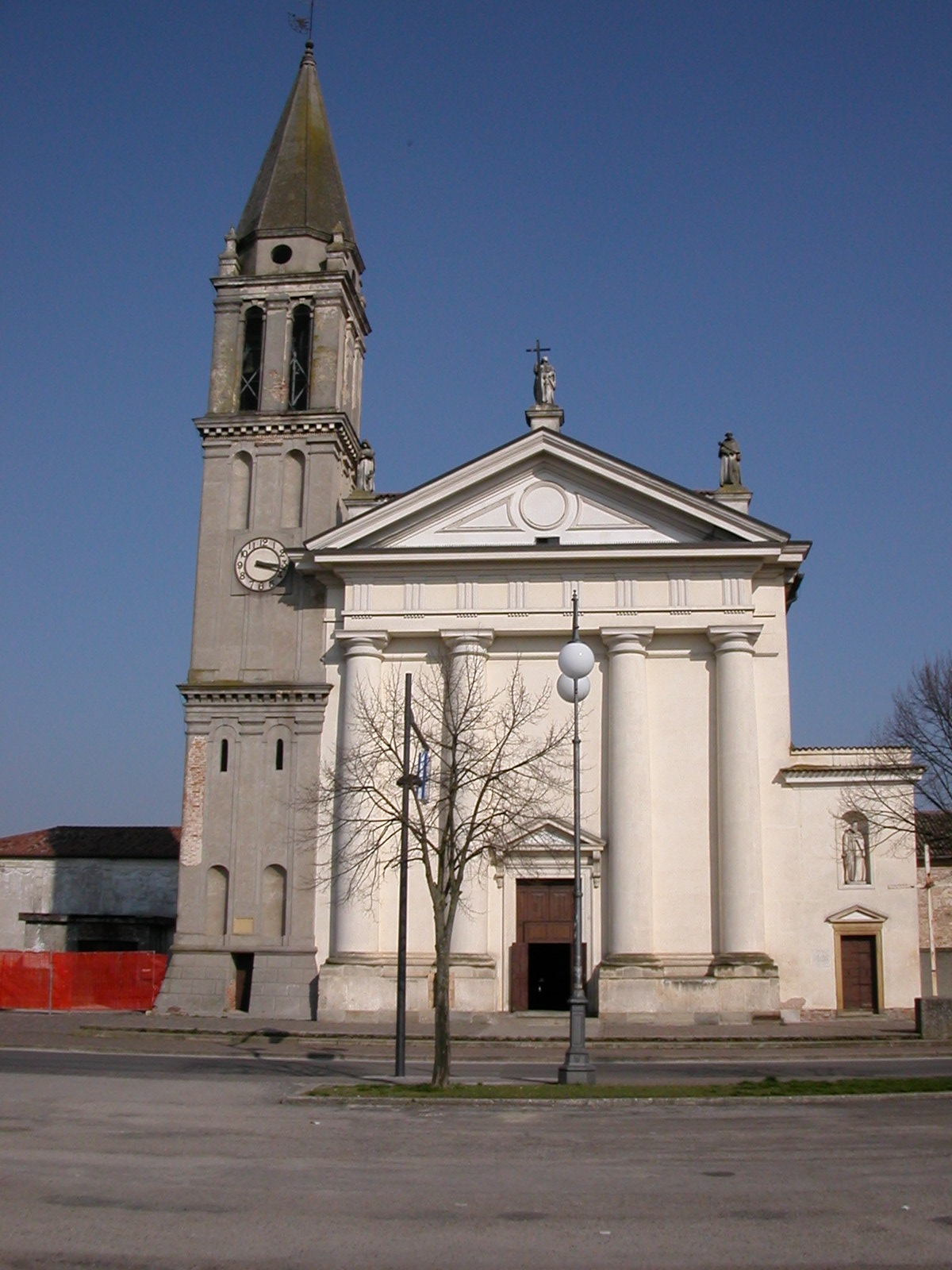 Chiesa parrocchiale, Sant'Elena (Padova)